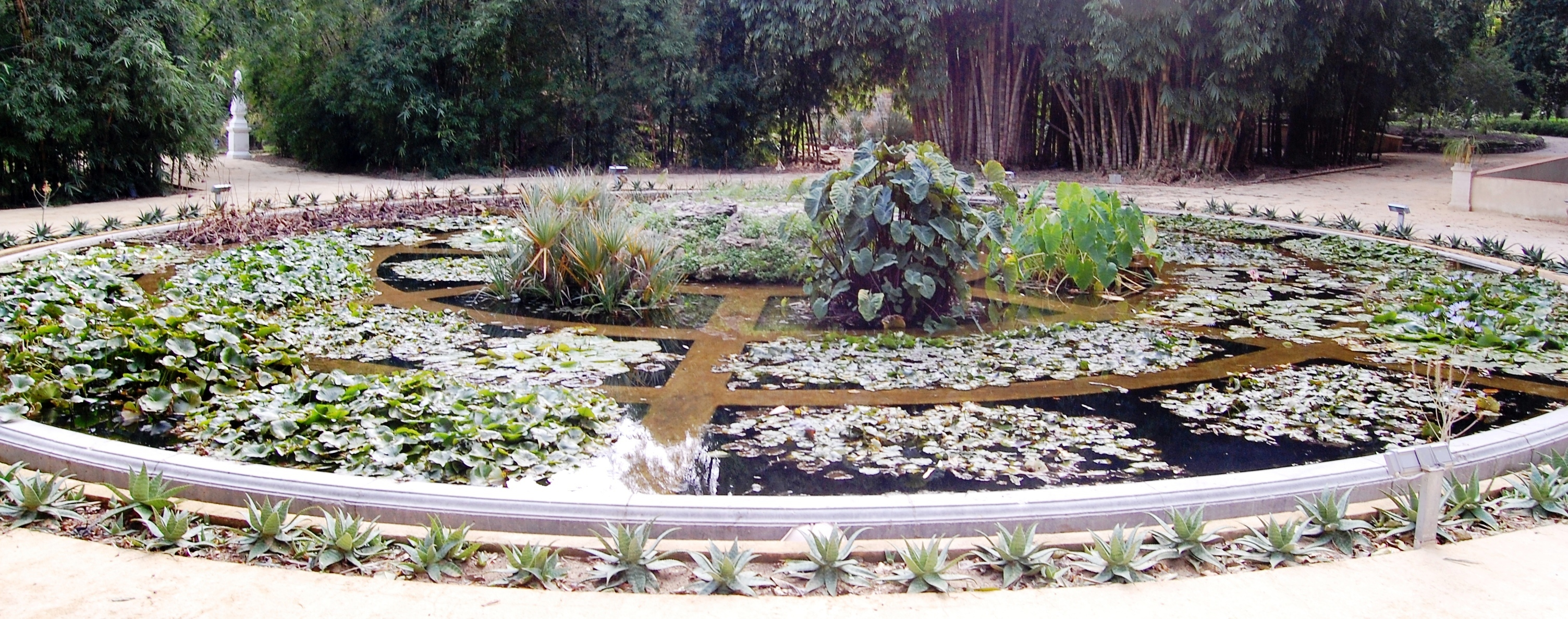 Orto botanico di Palermo - Aquarium